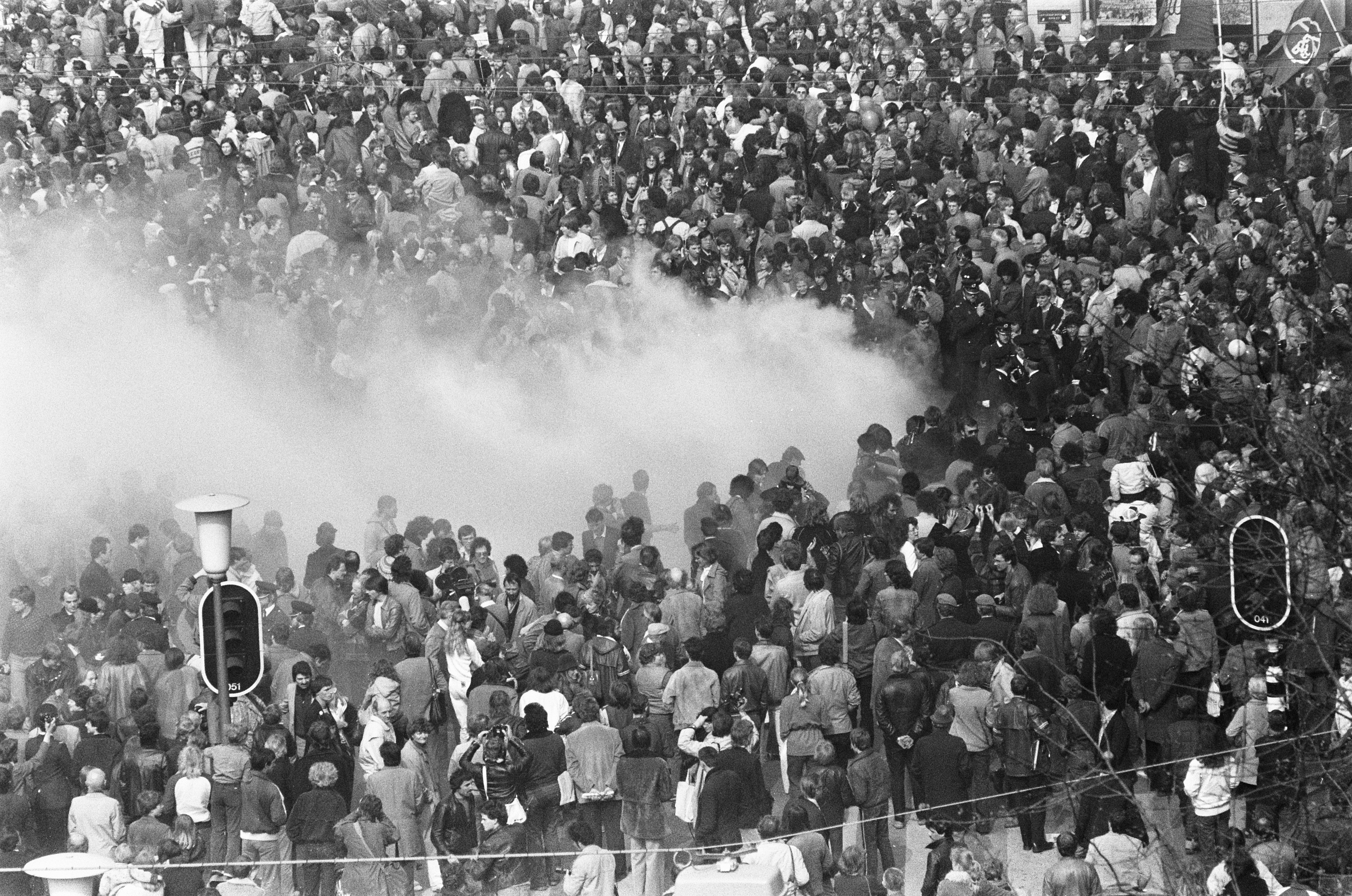 Collectie / Archief : Fotocollectie Anefo Reportage / Serie : [ onbekend ] Beschrijving : Troonswisseling 30 april , overzichten van de Dam; overzicht met rookbom Datum : 30 april 1980 Trefwoorden : ROOKBOMMEN, Troonswisselingen Fotograaf : Bogaerts, Rob / Anefo Auteursrechthebbende : Nationaal Archief Materiaalsoort : Negatief (zwart/wit) Nummer archiefinventaris : bekijk toegang 2.24.01.05 Bestanddeelnummer : 930-7988